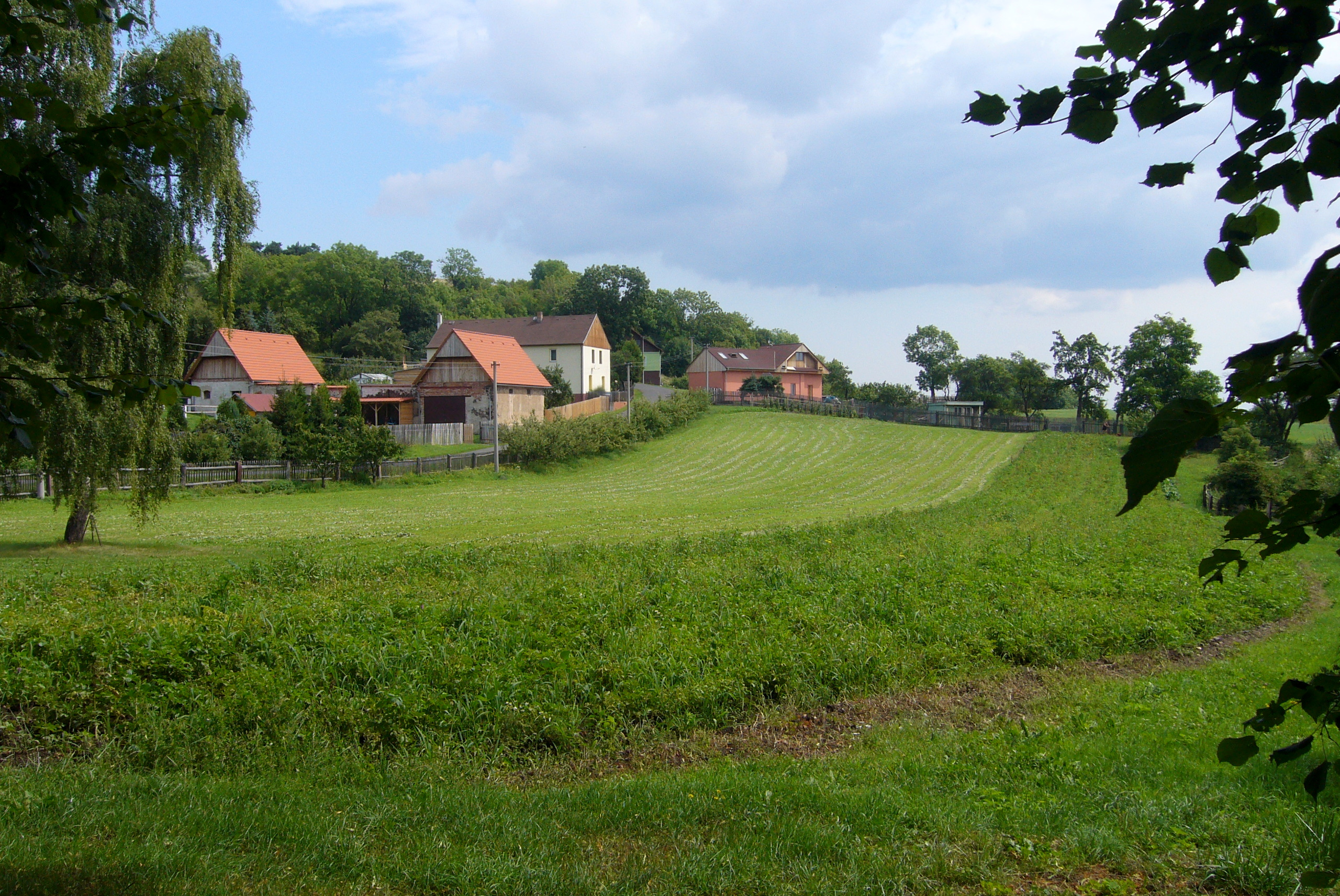 Vlkaň - pohled od západu